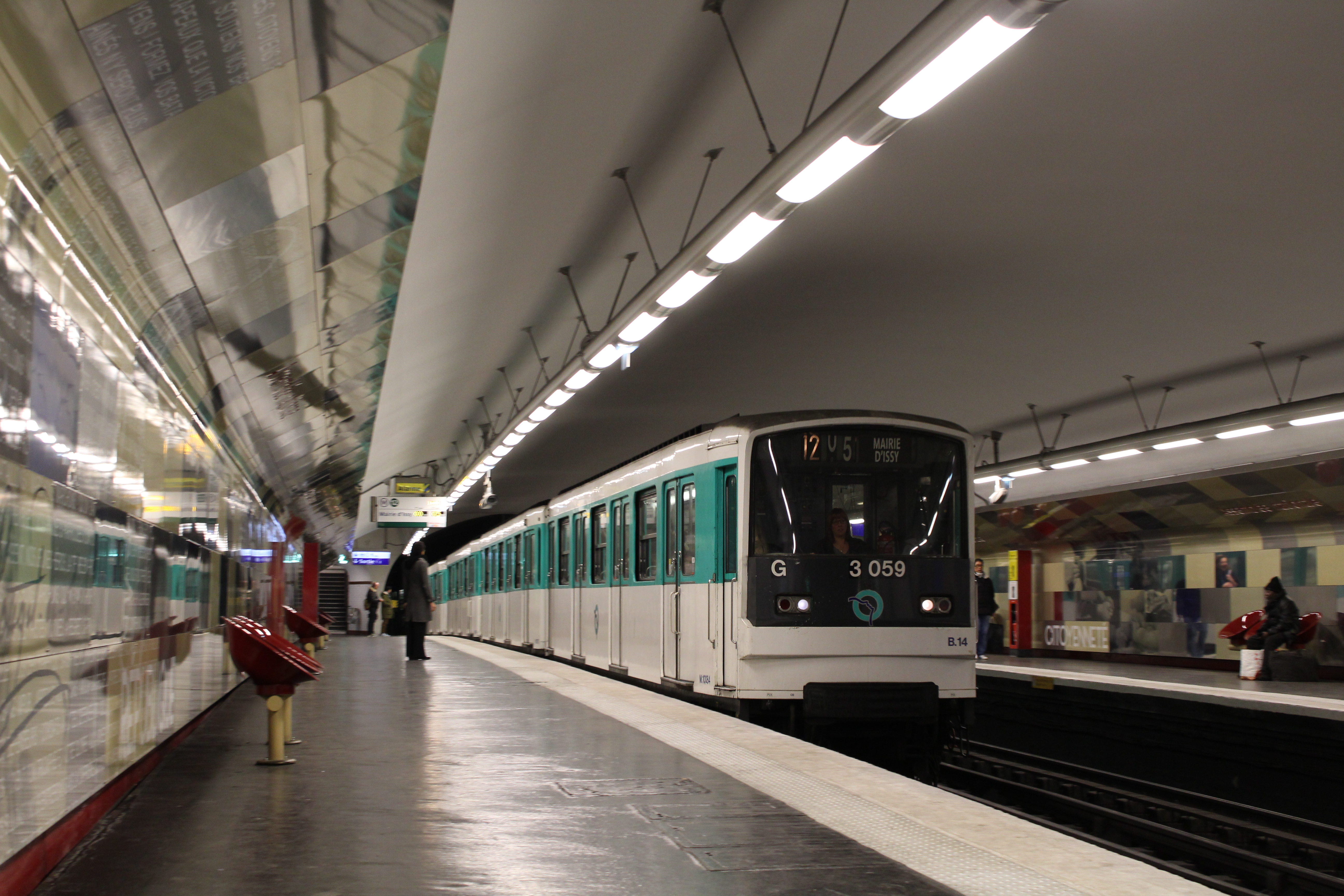 Rame MF 67 n°13059 sur la ligne 12 du métro de Paris à la station Assemblée nationale.